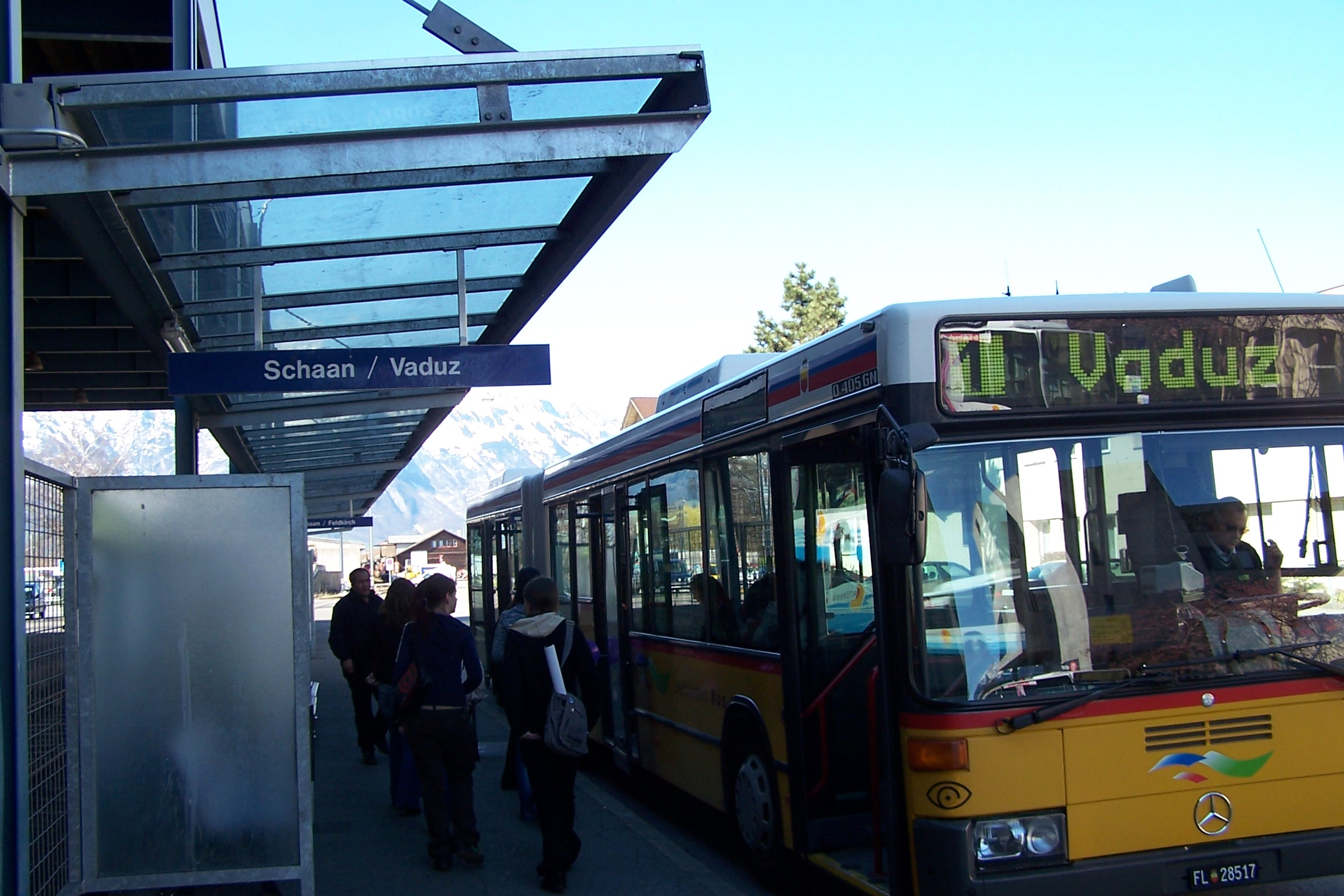 Liechtenstein Bus, Liechtenstein Bus Anstalt, LTB: Bus von Buchs SG nach Vaduz